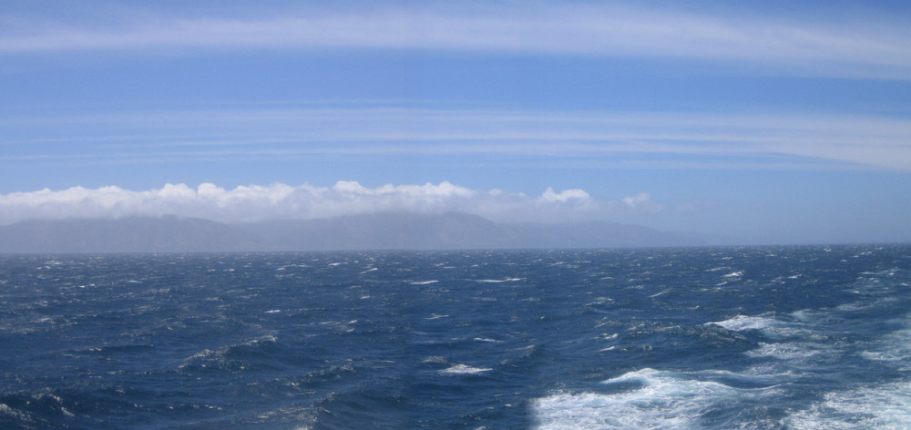 Photo Détroit de Cook en Nouvelle-Zélande (photo personnel 2006) Utilisateur:FRED